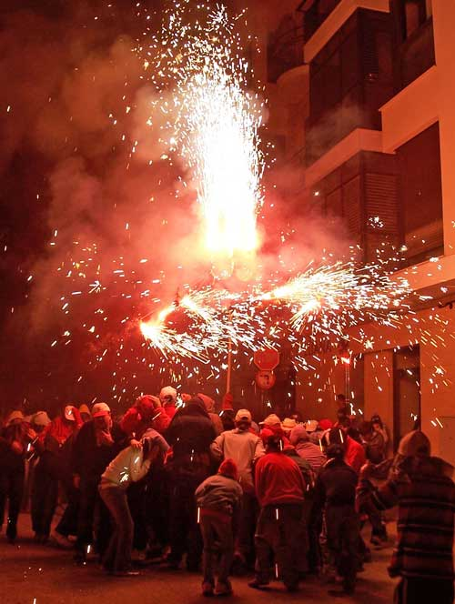 Correfoc de Dimonis de l'Avern a l'Eliana